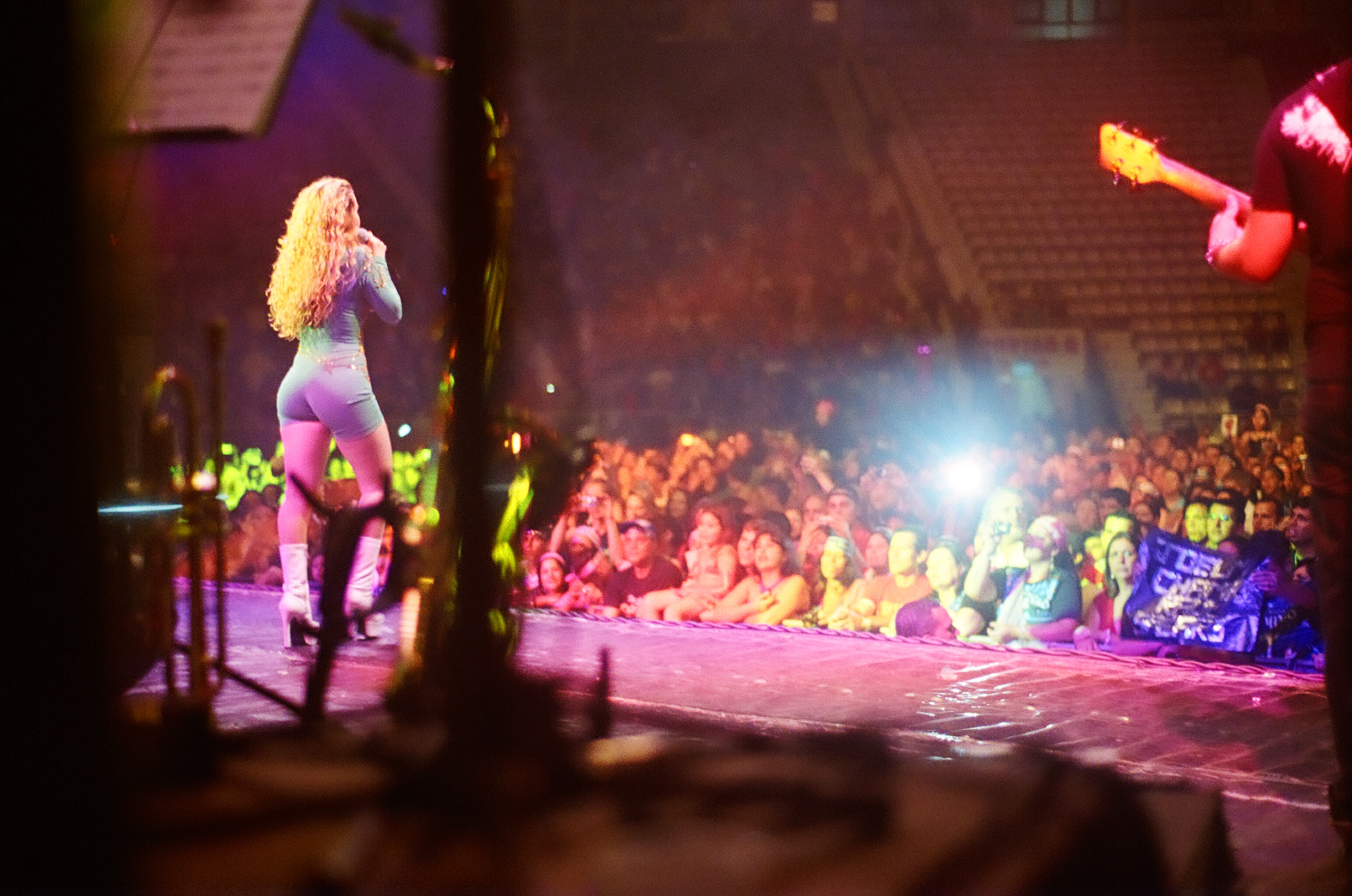 Banda Calypso em um show em Porto Alegre em 2008.